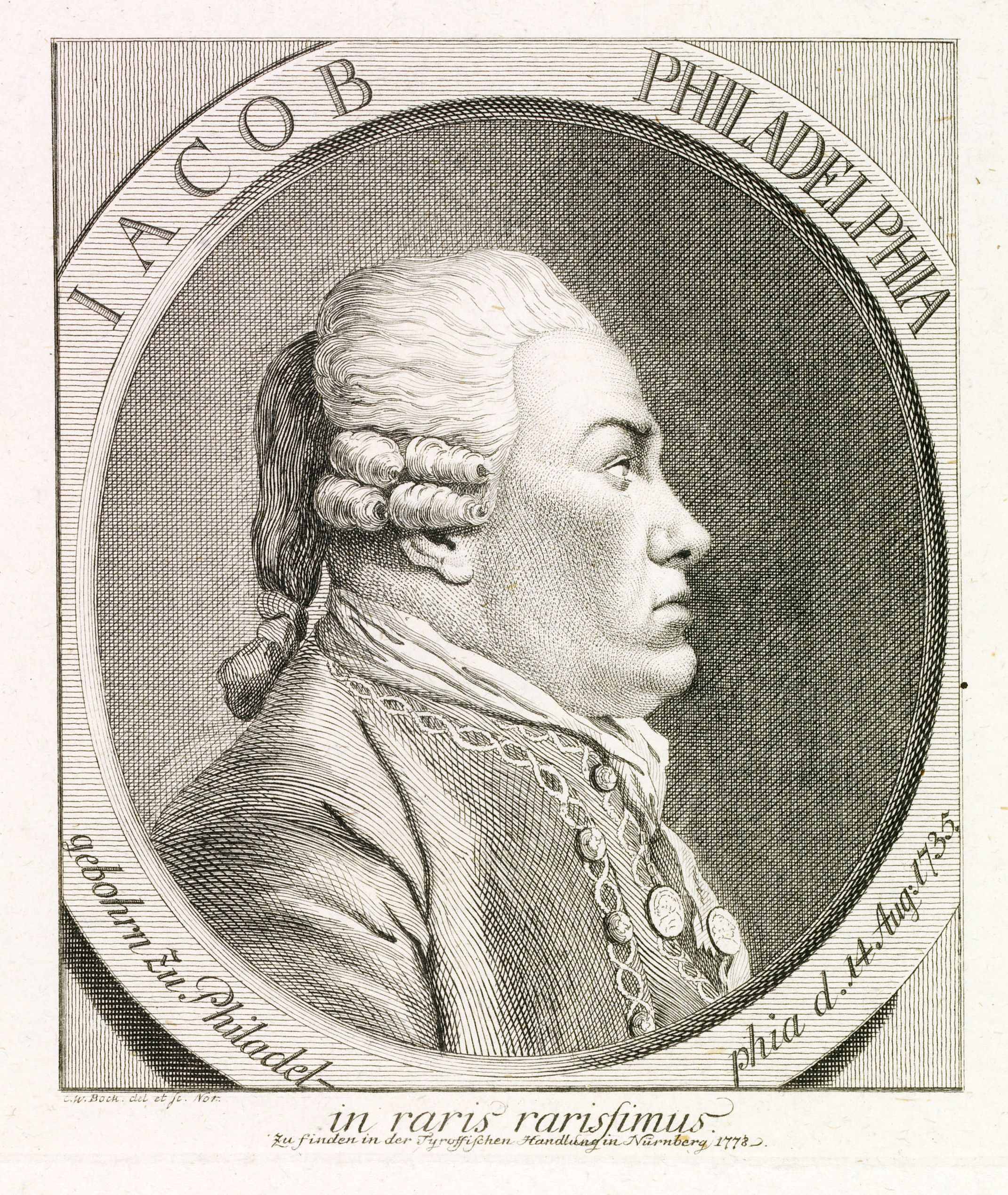 Bildnis von Jacob Philadelphia